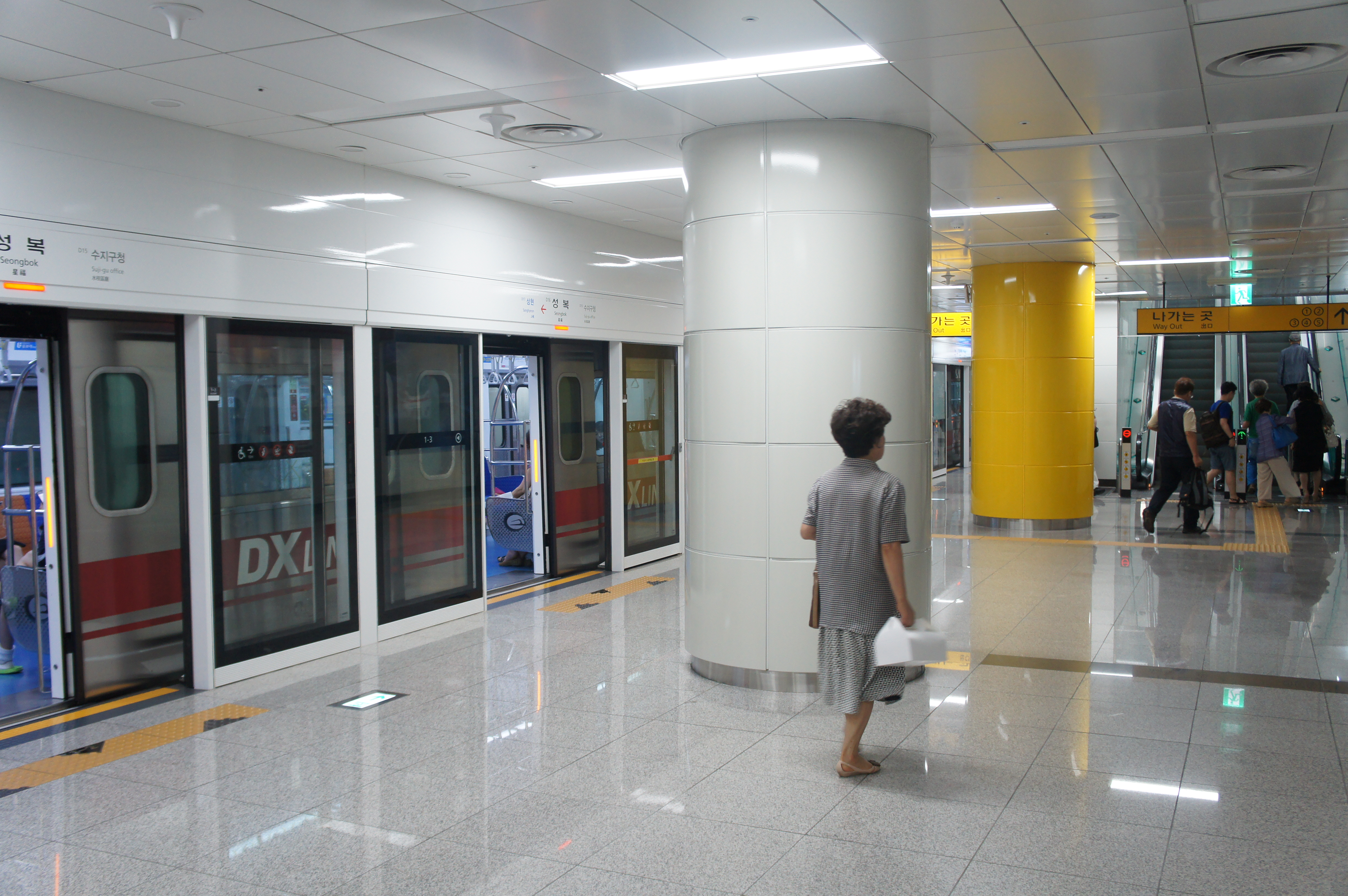 성복역 승강장